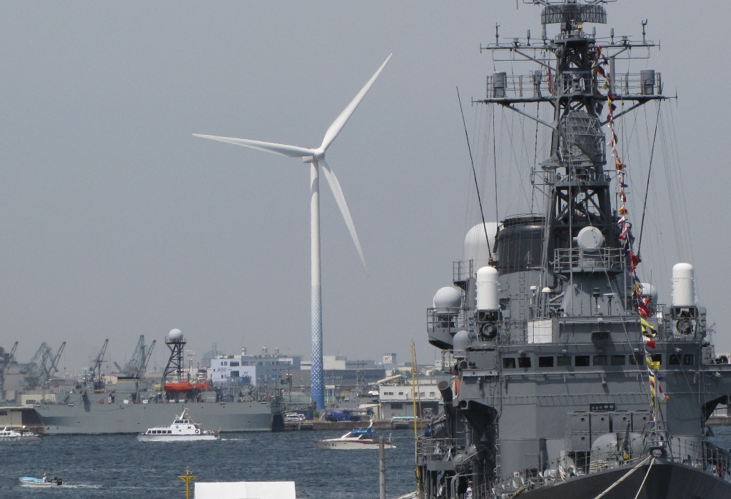 横浜市風力発電所「ハマウィング」。右横は護衛艦しらゆき。